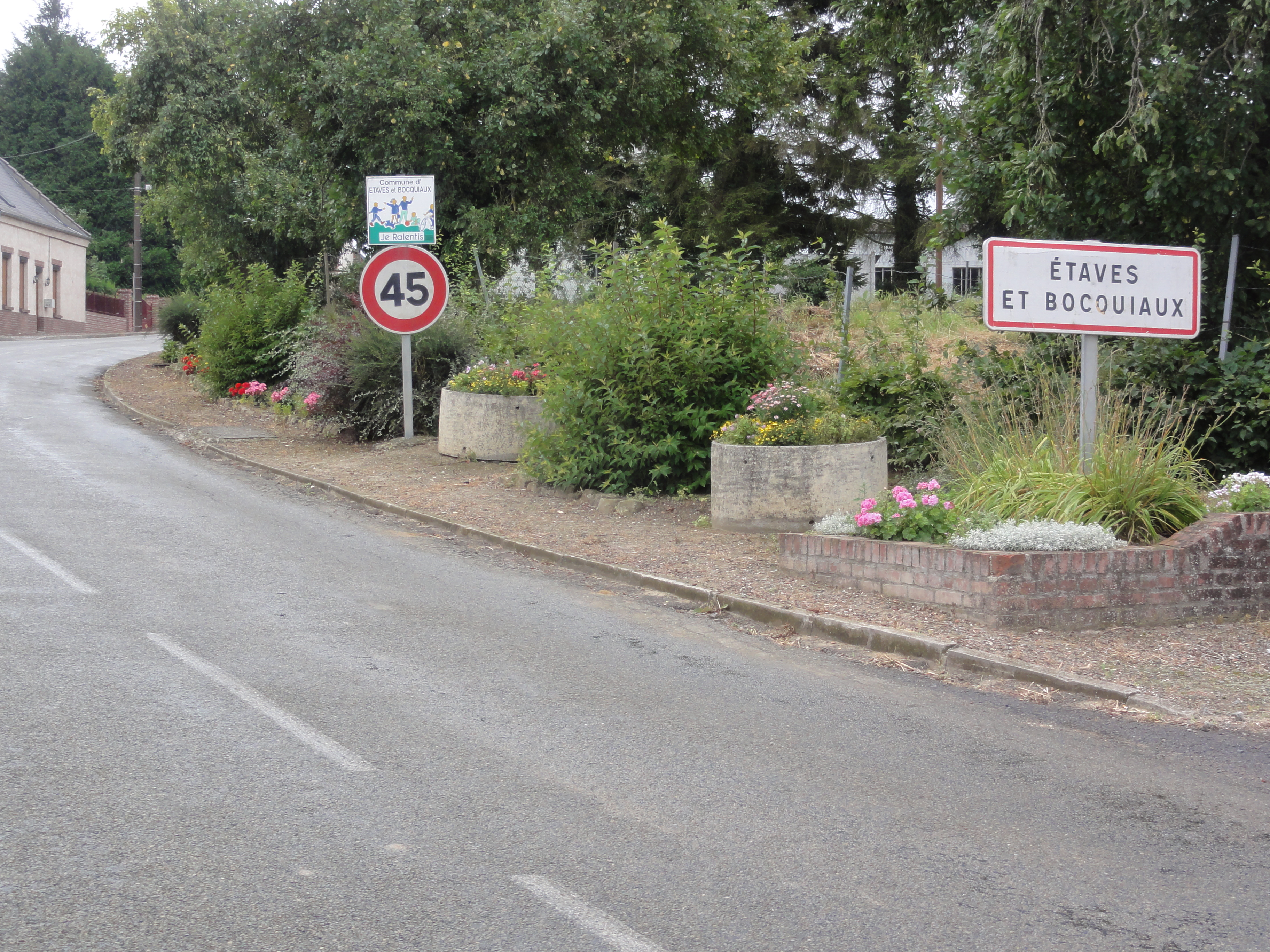 Étaves-et-Bocquiaux (Aisne)